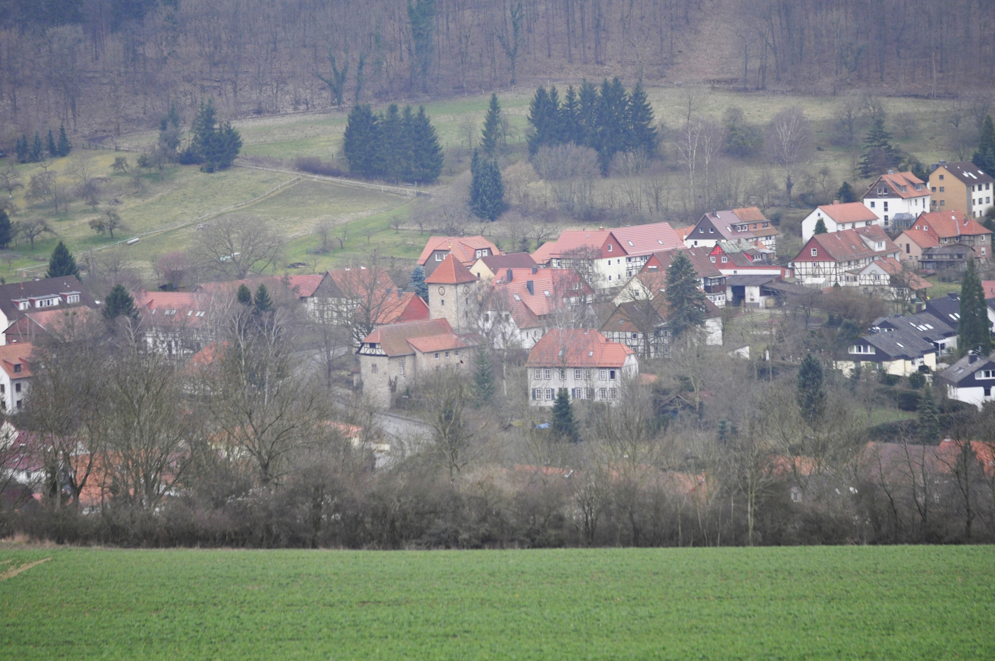 Herberhausen bei Göttingen, aufgenommen von Norden (Nähe Kartoffelstein), 1. März 2014. Foto: Francisco Welter-Schultes.